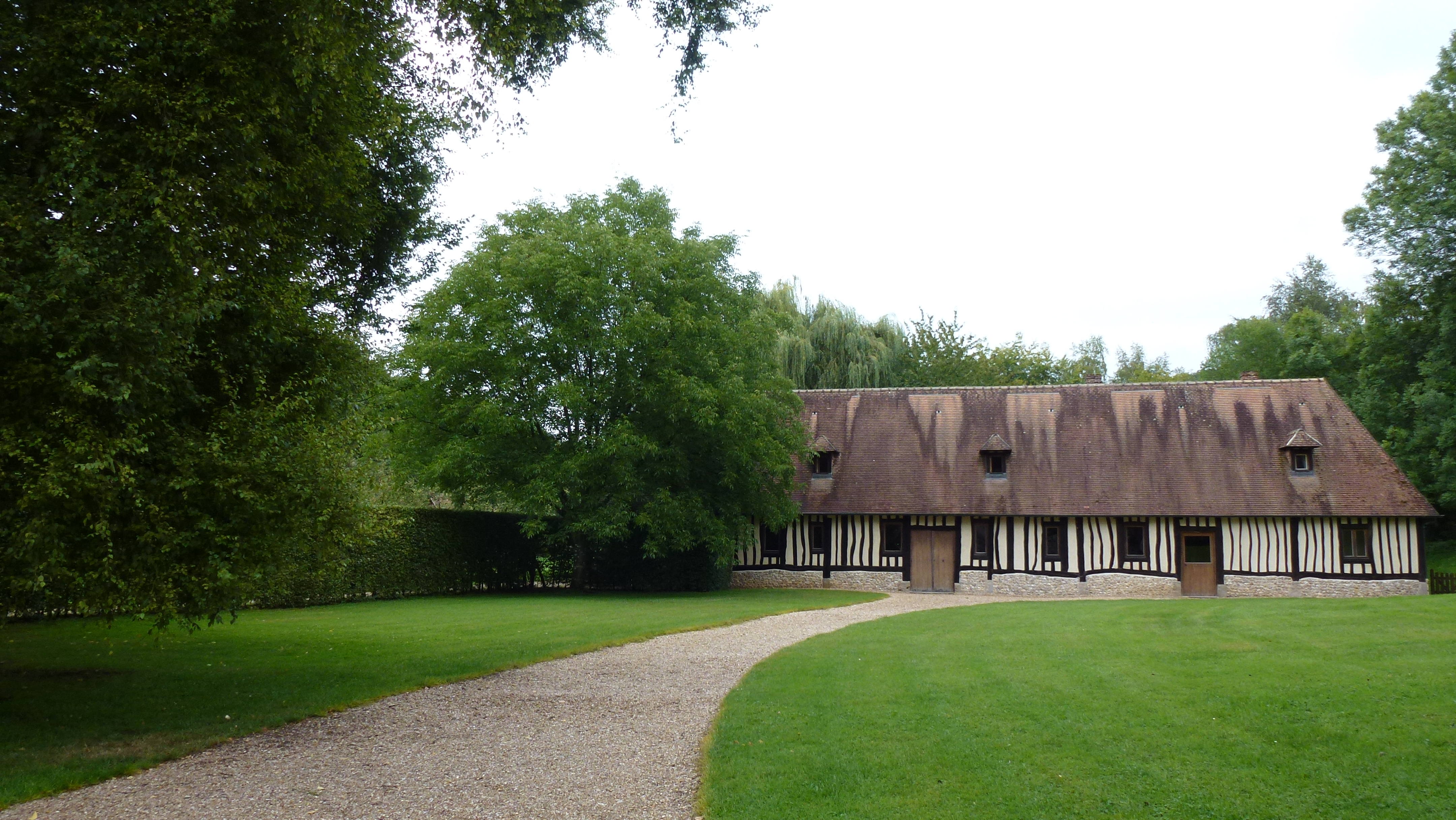 Maison Saint-Benoit